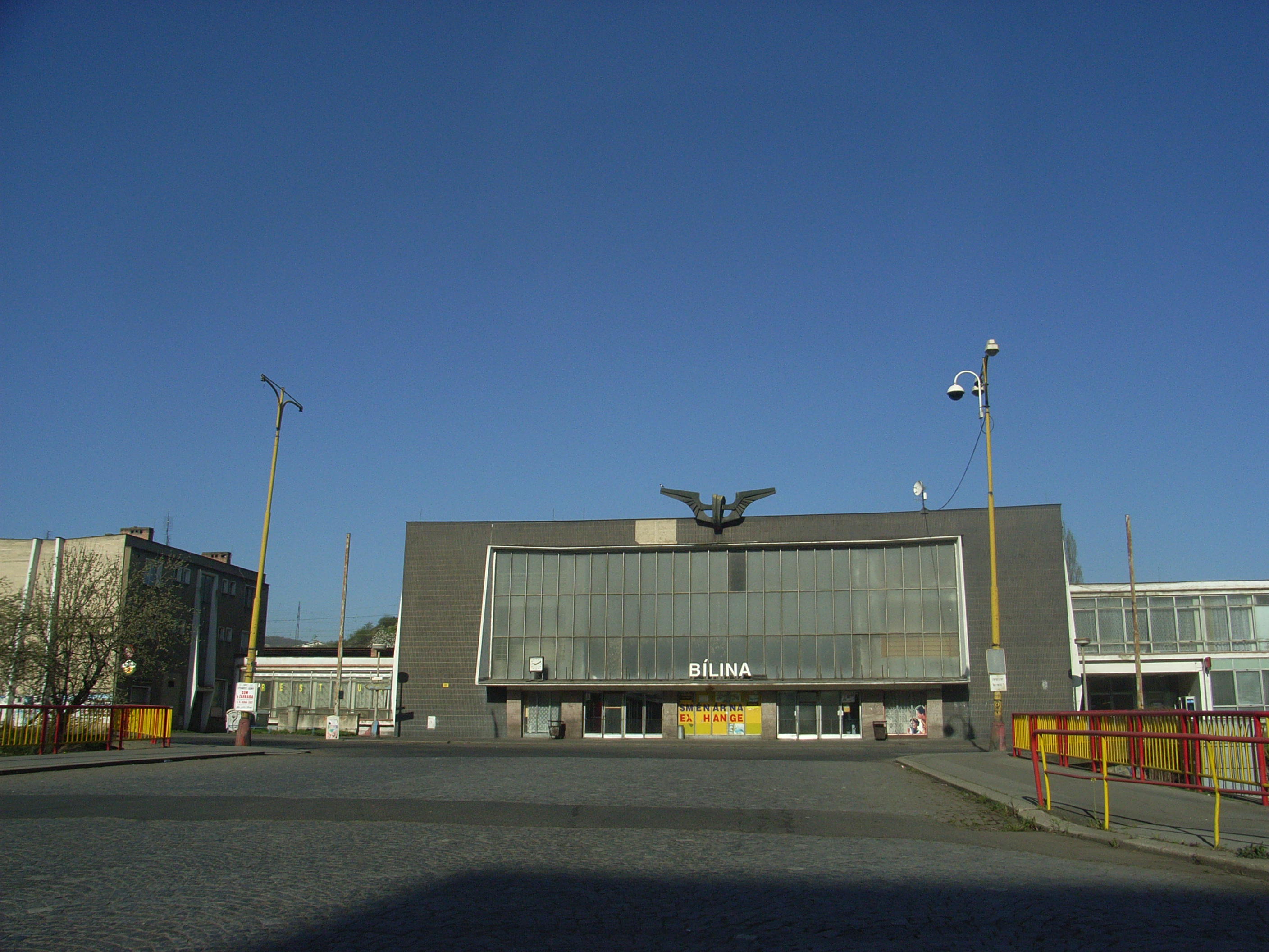 Železniční stanice Bílina.